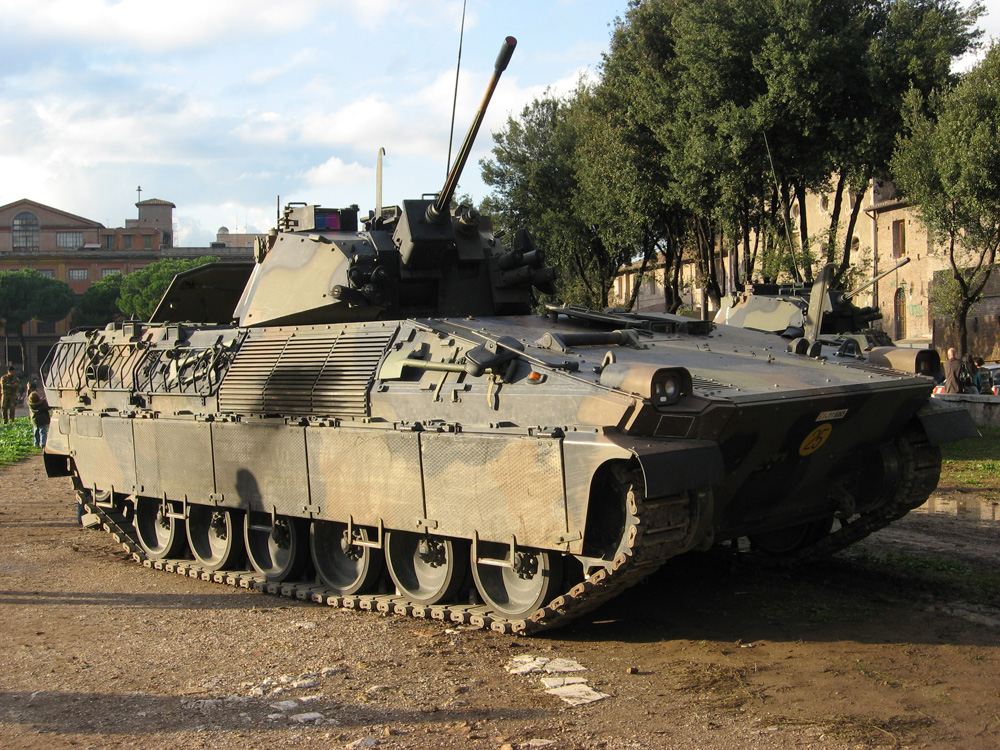 Mezzo corazzato "Dardo", in dotazione all'Esercito Italiano. L'esemplare è stato fotografato in occasione della Festa delle Forze Armate, in esposizione pubblica al circo Massimo (Roma).